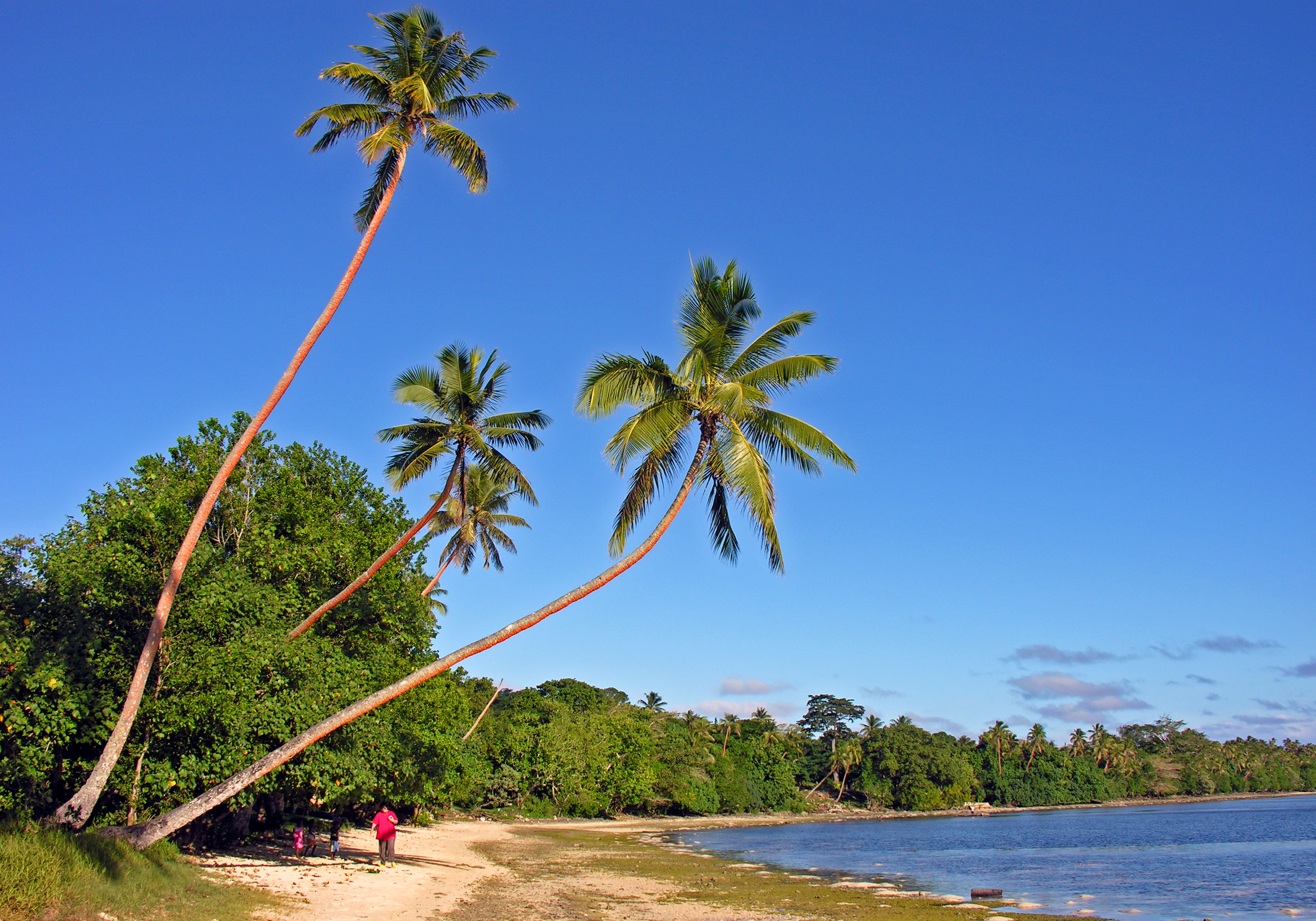 Erakor Beach, Éfaté Island, Vanuatu, 2 June 2006